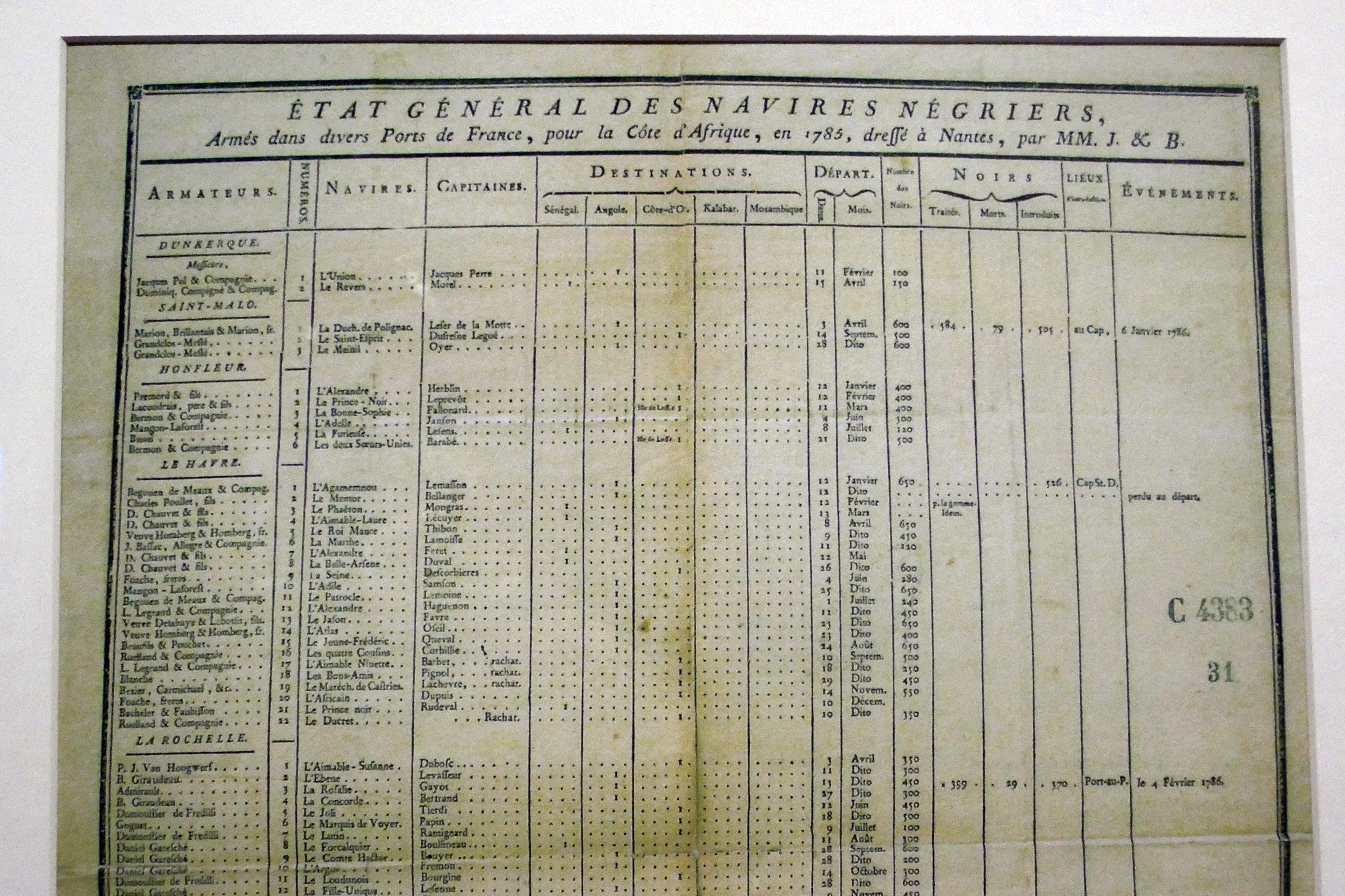 Etat général des navires négriers armés dans divers ports. 1785, fac simile, Archives départementales de la Gironde. Musée d'Aquitaine, Bordeaux.